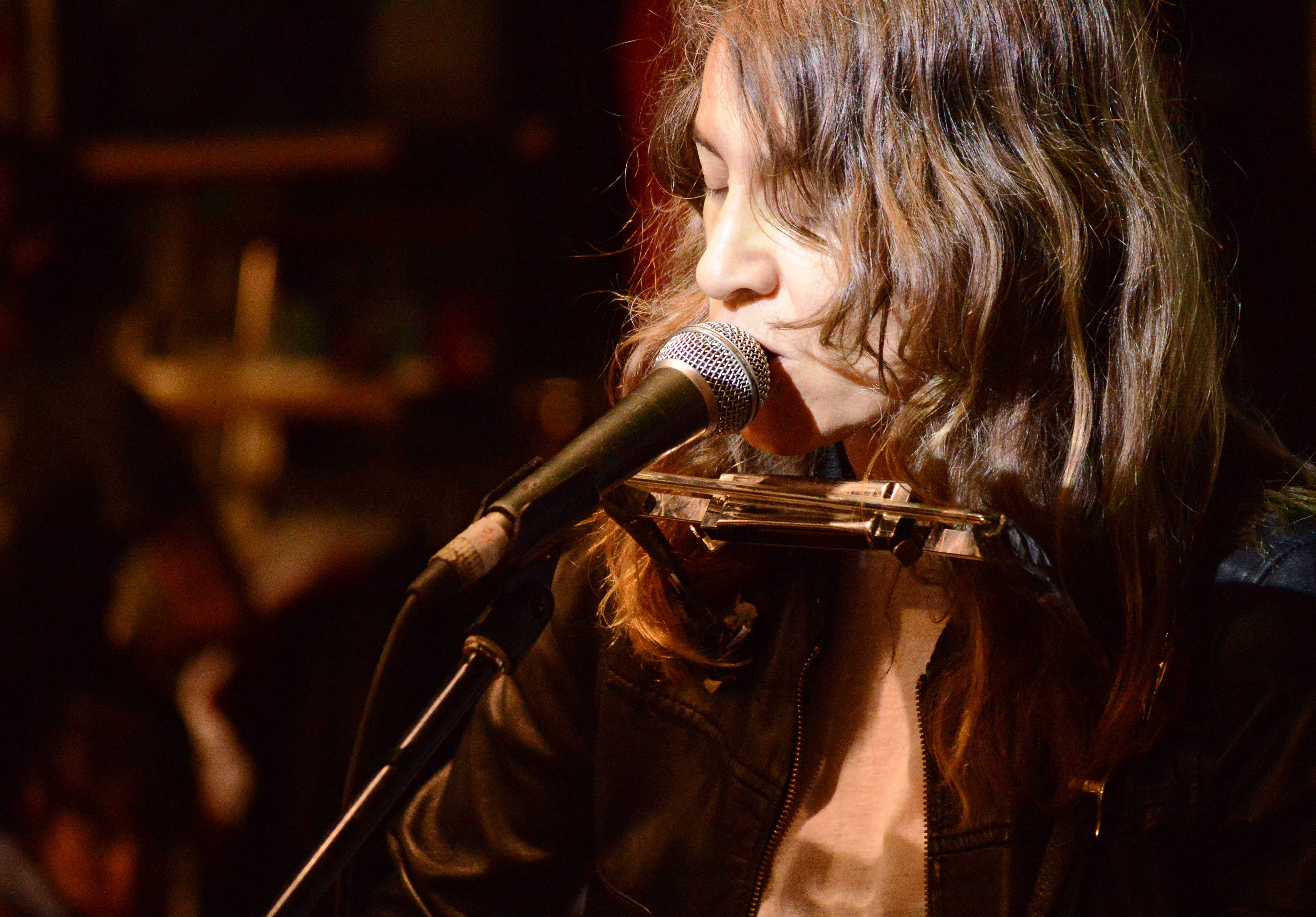 EXPO “Diagrama” X Tan Vargas / Música en Vivo X Colombina Parra